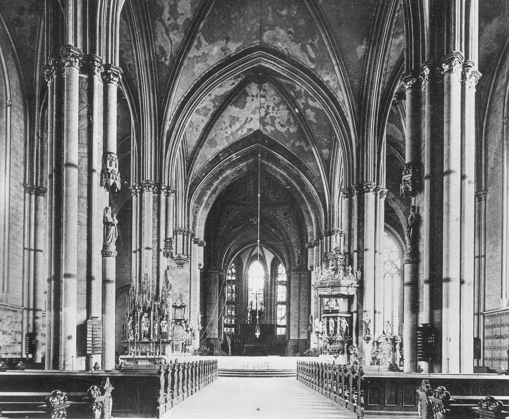 Dom Minden